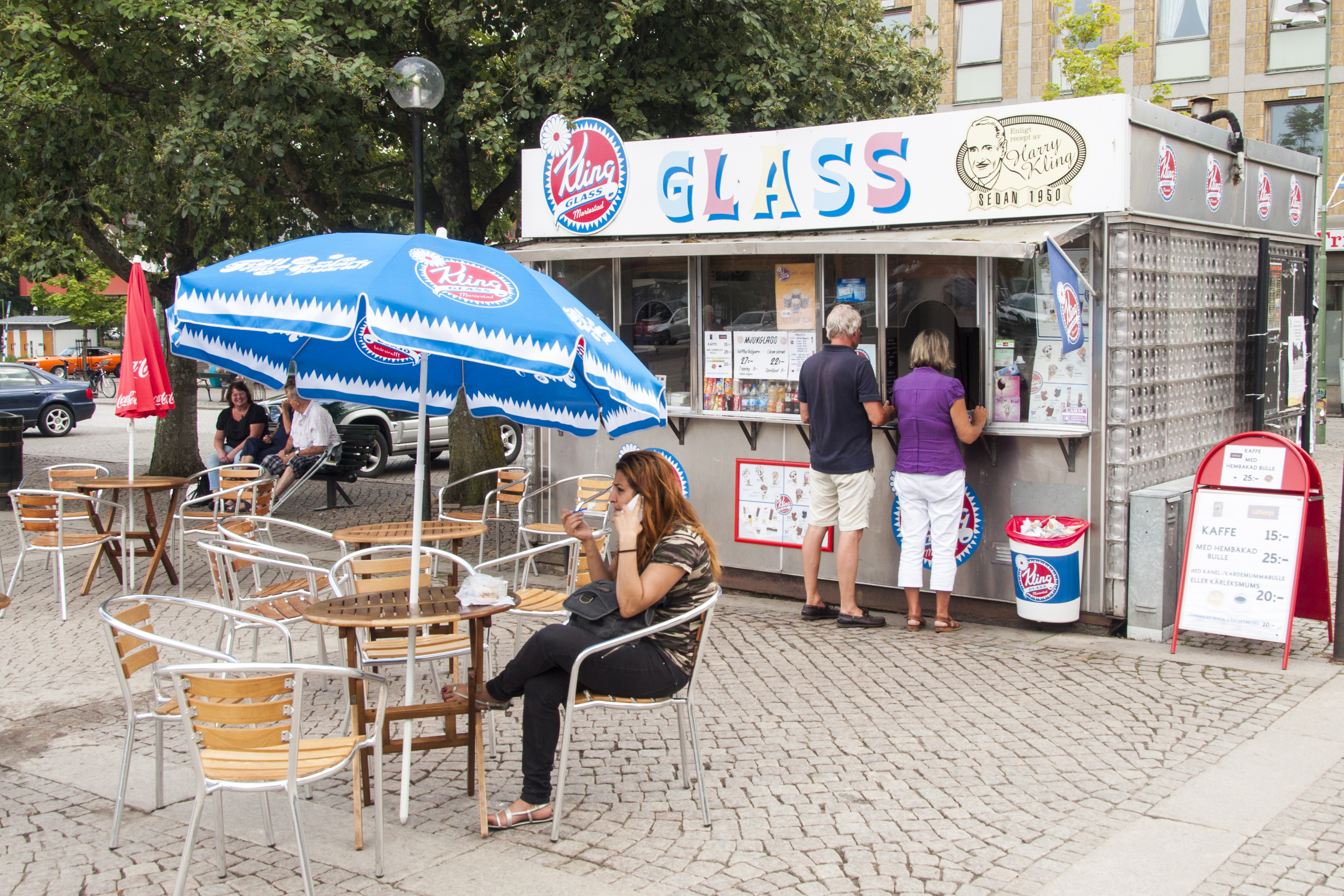 Glasskiosk i på Stora torget Mariestad - Kling Glass